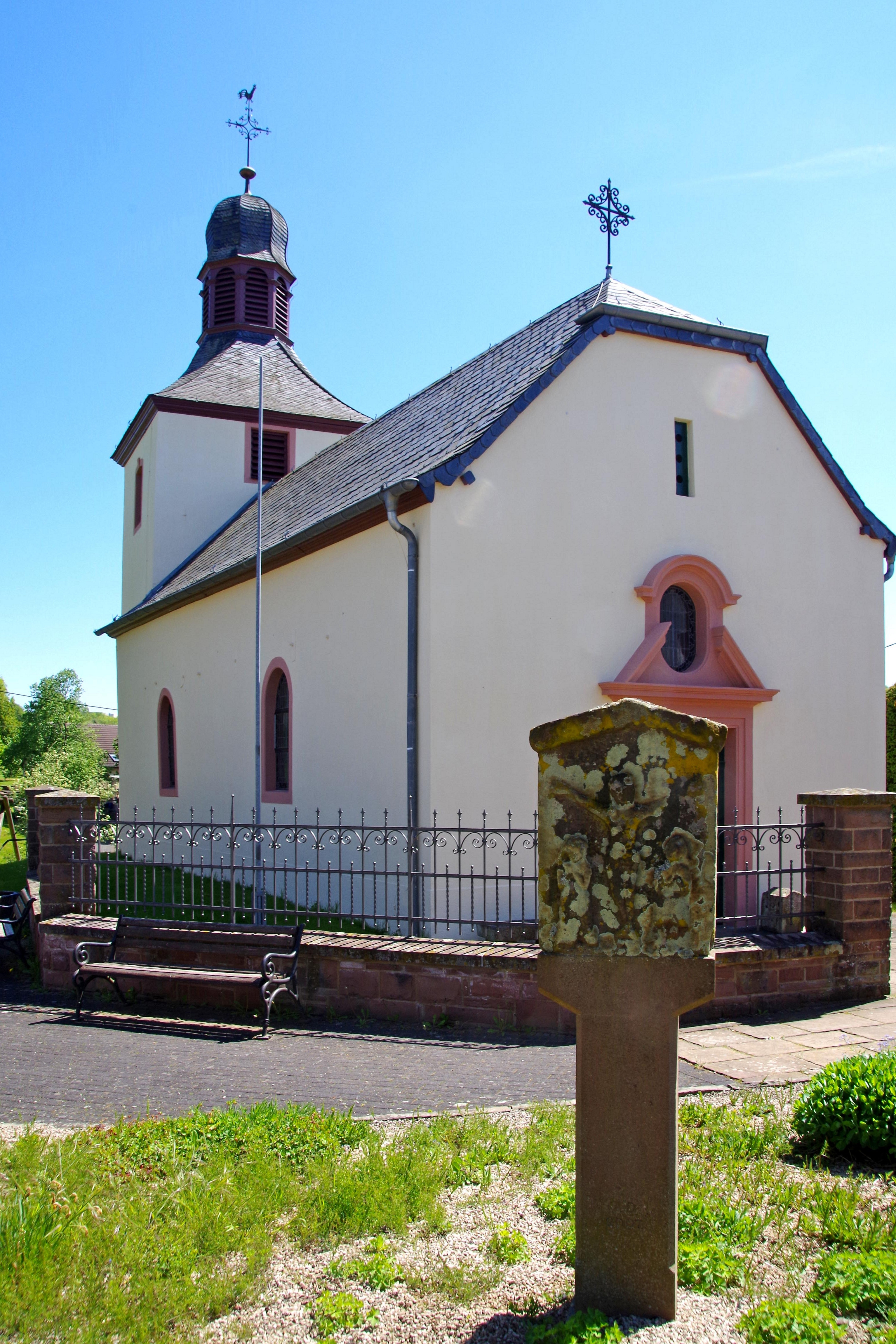 St. Johannes Baptist (Sefferweich) von Nordwesten